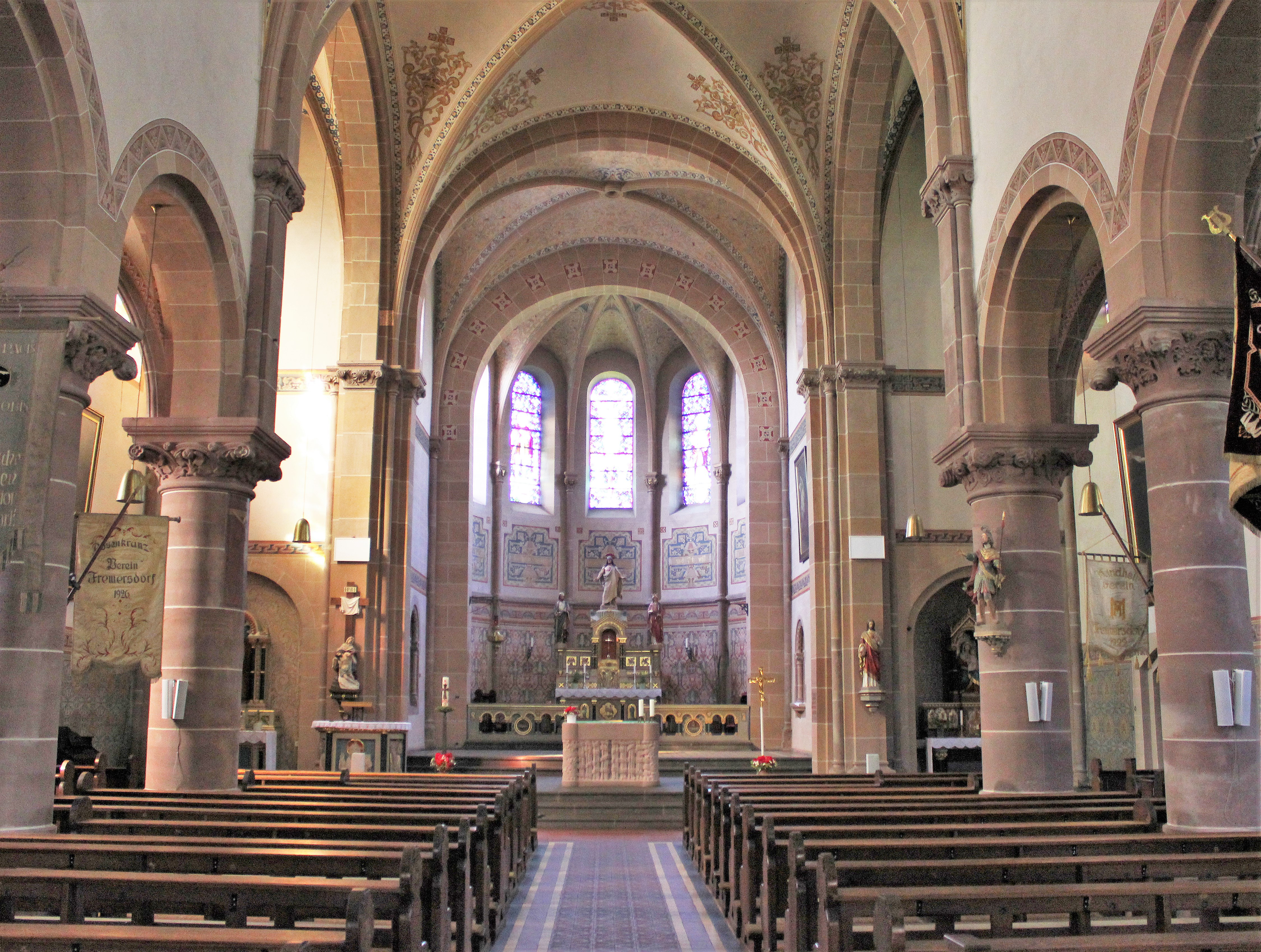 Blick ins Innere der katholischen Pfarrkirche St. Mauritius in Fremersdorf, einem Ortsteil der Gemeinde Rehlingen-Siersburg, Landkreis Saarlouis, Saarland